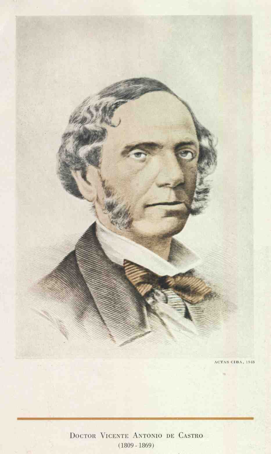 Vicente Antonio de Castro y Bermúdez. Sancti Spíritus, Cuba. Médico introductor del uso de la anestesia general en Cuba. Precursor de la cirugía angiológica y oftálmica en Cuba y América Latina. Masón. Fundador principal de la red de logias independentistas "Gran Oriente de Cuba y las Antillas.